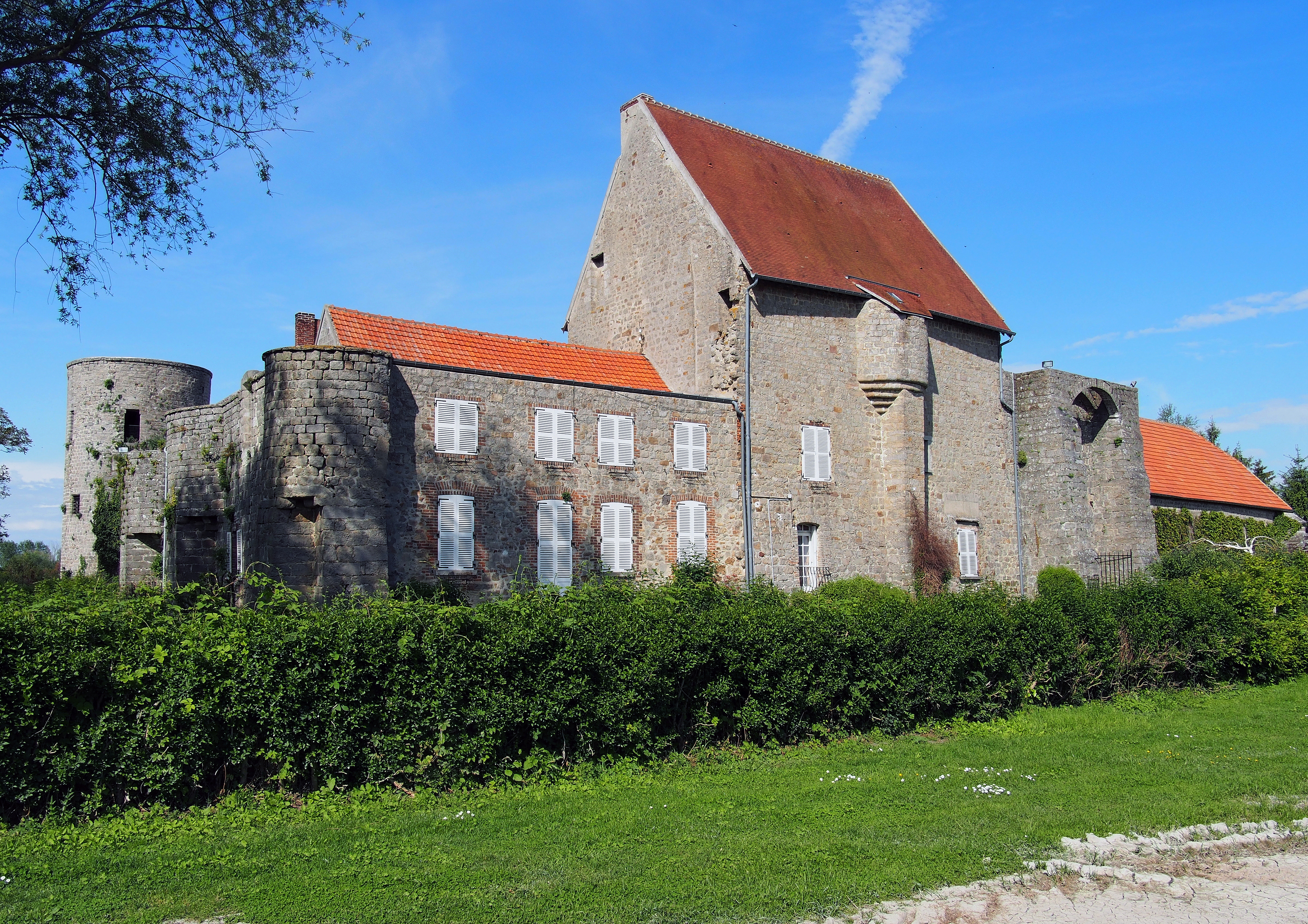 Château d'Aulnois-sous-Laon, (Inscrit, 24 octobre 1927) .